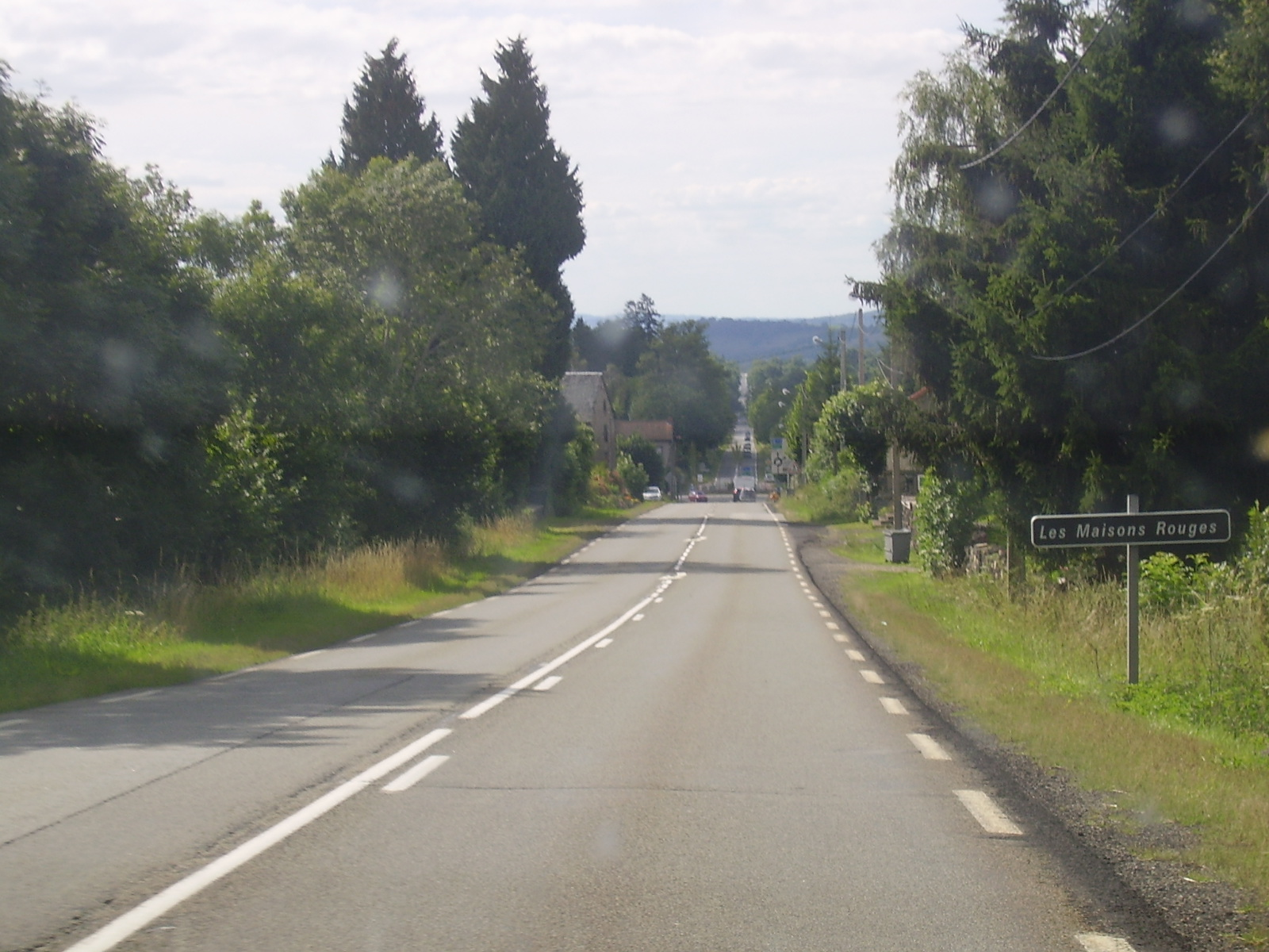 Lieu-dit Les Maisons Rouges, commune de Saint-Ours, Puy-de-Dôme, Auvergne, France, sur la RD 941 en direction de Pontgibaud.